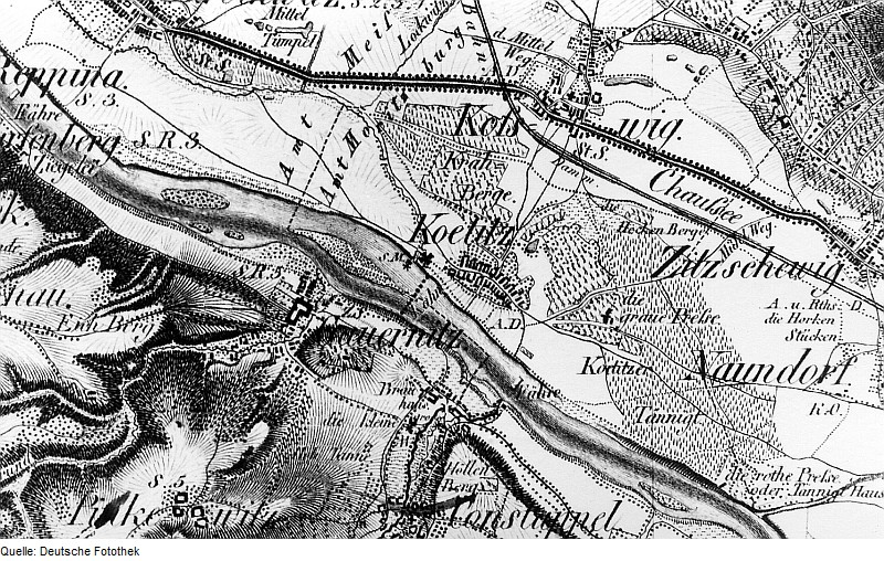 Original image description from the Deutsche Fotothek Coswig-Kötitz. Oberreit, Sect. Dresden, 1821/22